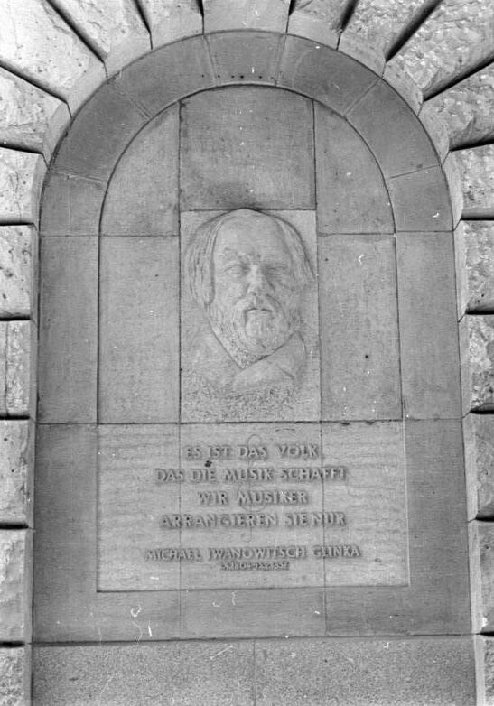 Berlin, Thälmannplatz, "Glinka Haus", Relief Zentralbild Gielow 18.3.52 Das Glinka-Haus, das neue Gebäude der Gesellschaft für deutsch-sowjetische Freundschaft am Thälmannplatz in Berlin UBz: Das Glinka-Relief von Olly Wallschmidt an der Aussenwand des Gebäudes